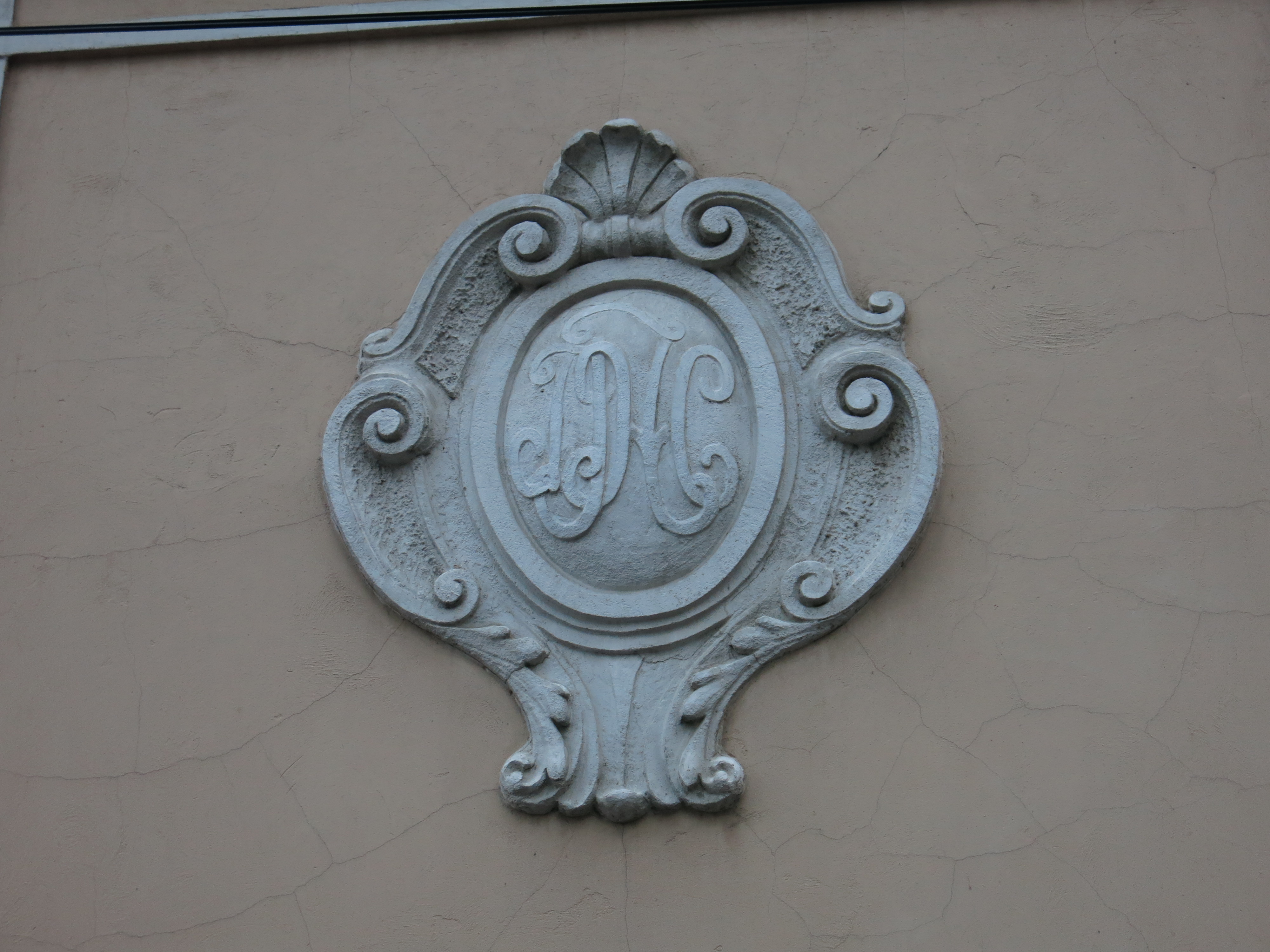 Кућа Поповића